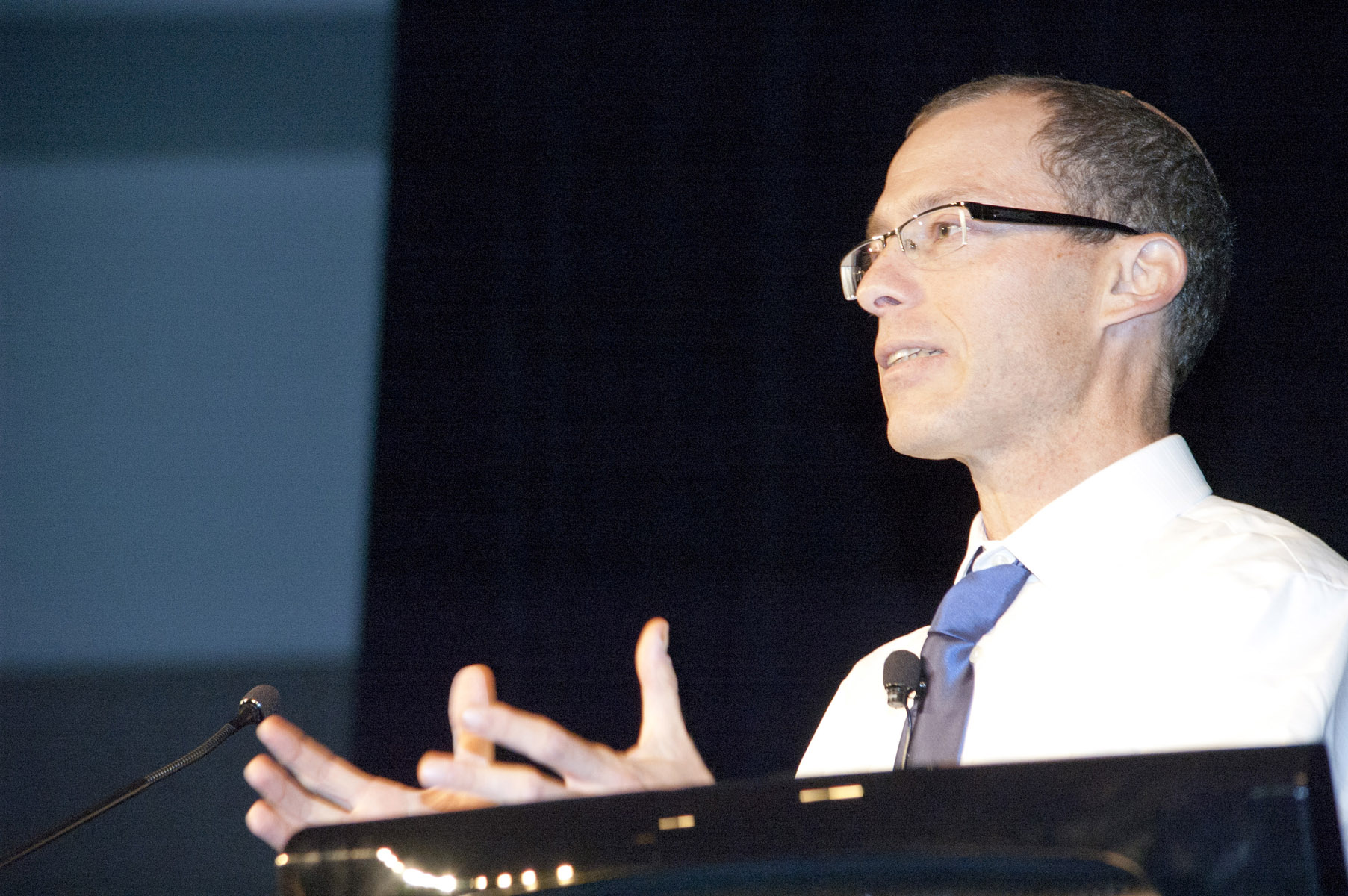 ISCB 2012 Overton Prize recipient Ziv Bar-Joseph